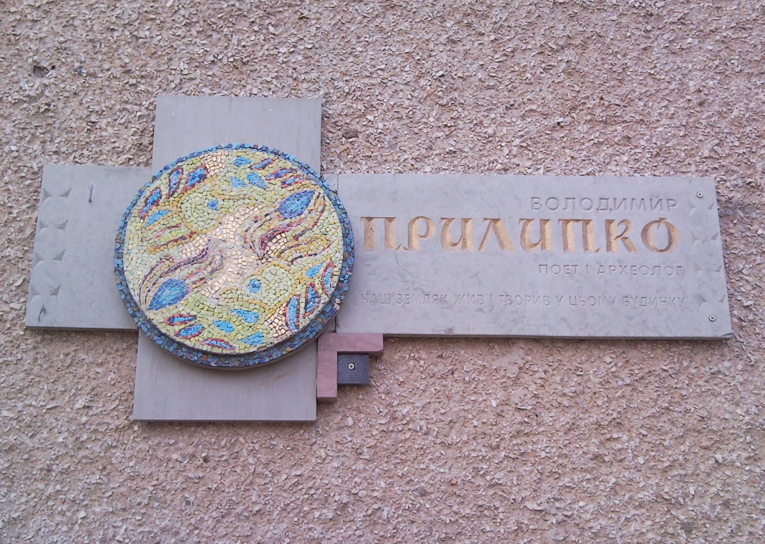 Vinnytsia 30-richya Str 9 Prylypko Memorial Plaque